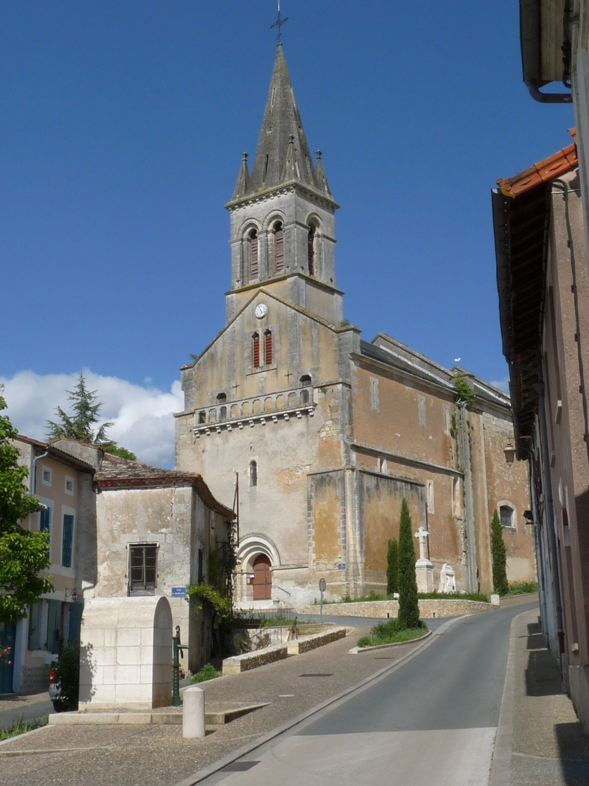 Place de l'ancien lavoir (à gauche) et église de Saint-Martin-de-Ribérac, Dordogne, France